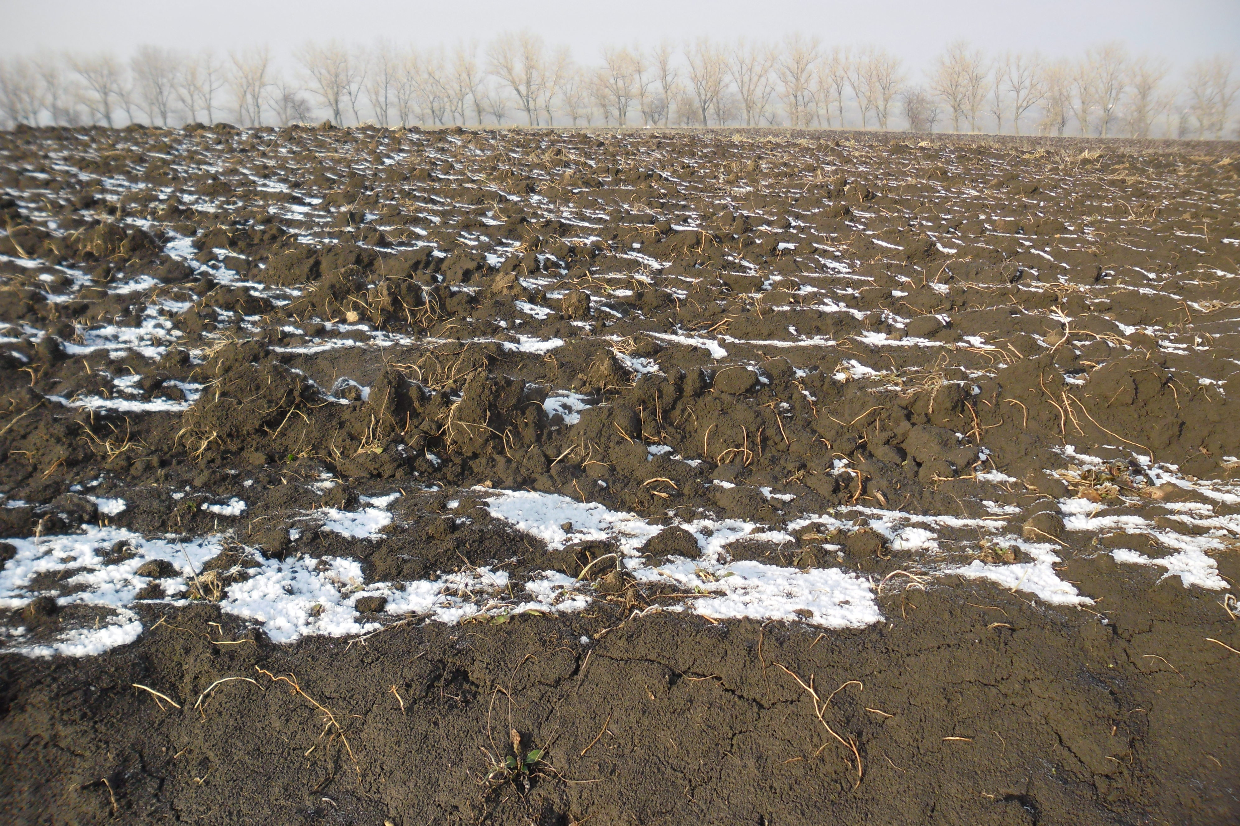 Рілля